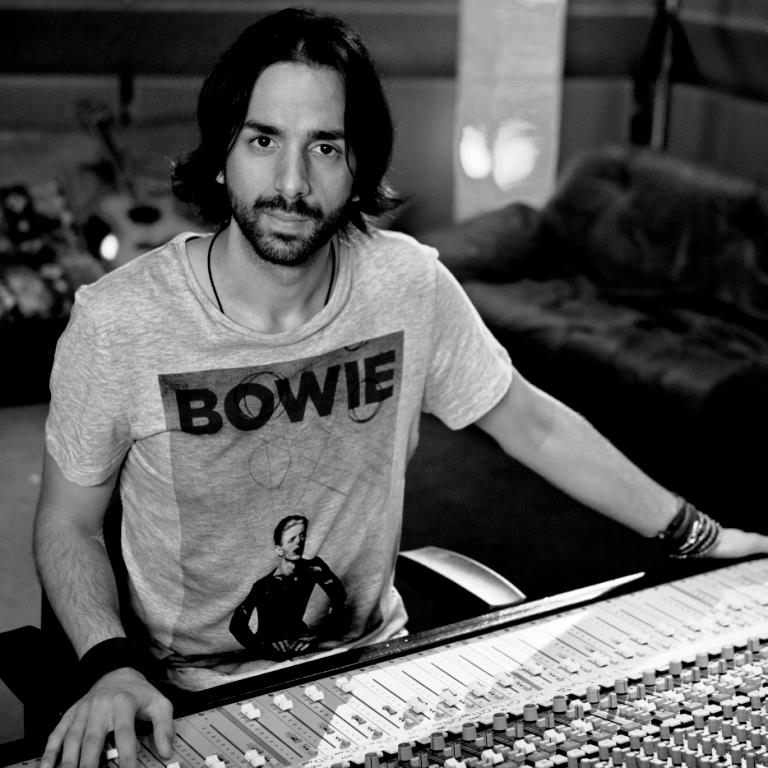 Sky van Hoff in den Hansa Studio Berlin.